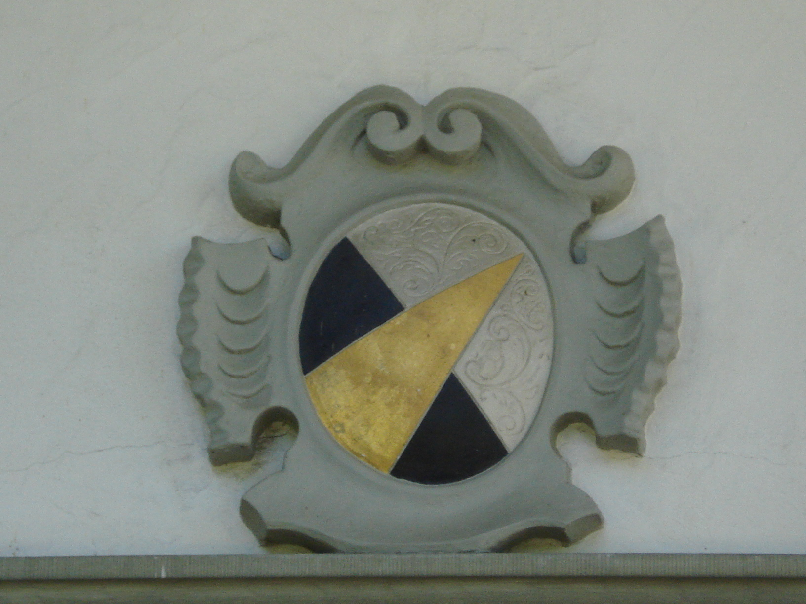 Das Buonaser Wappen auf der Kirche Risch.